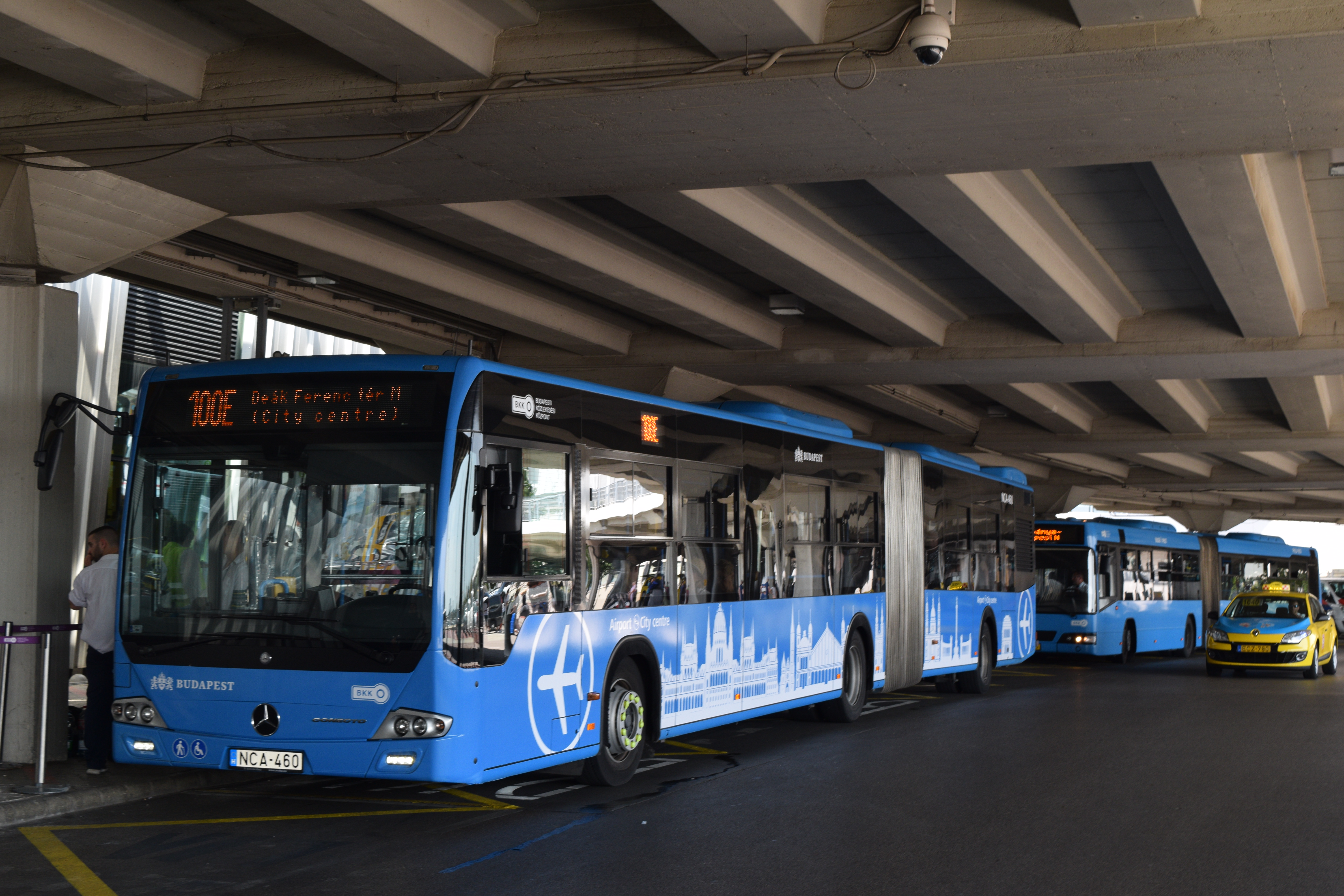 100E jelzésű Mercedes-Benz Conecto G típusú autóbusz, mögötte egy 200E jelzésű Volvo 7700A típusú autóbusz a budapesti Liszt Ferenc Nemzetközi Repülőtéren